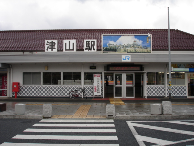 津山駅